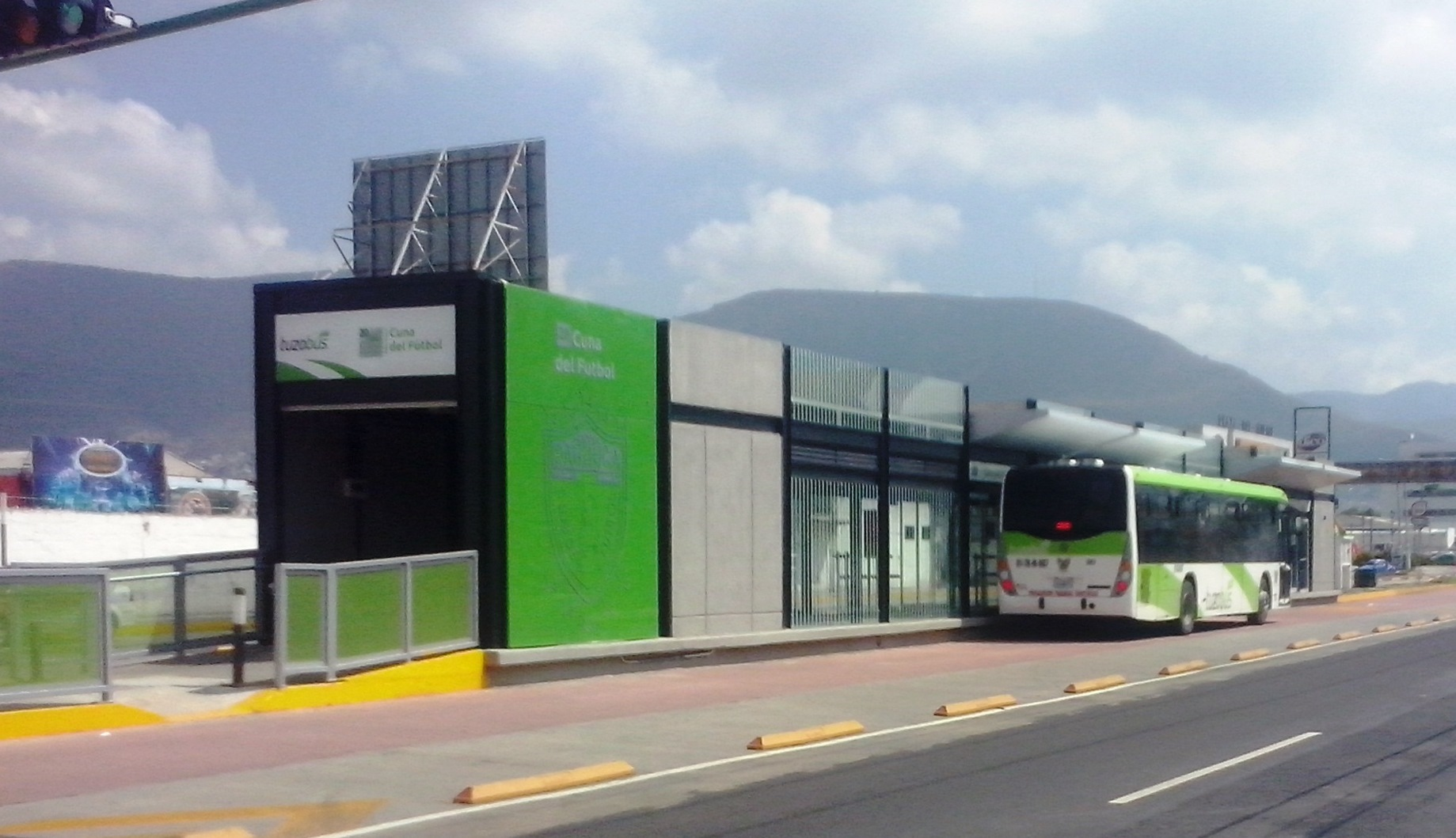 Estación Cuna del Fútbol (Poliforum) del Tuzobús.